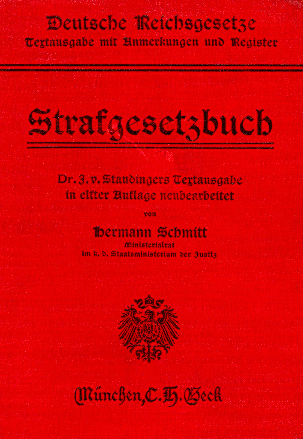 Deutsche Reichsgesetze, Strafgesetzbuch, 11. Auflage 1914, C. H. Beck Verlag, München